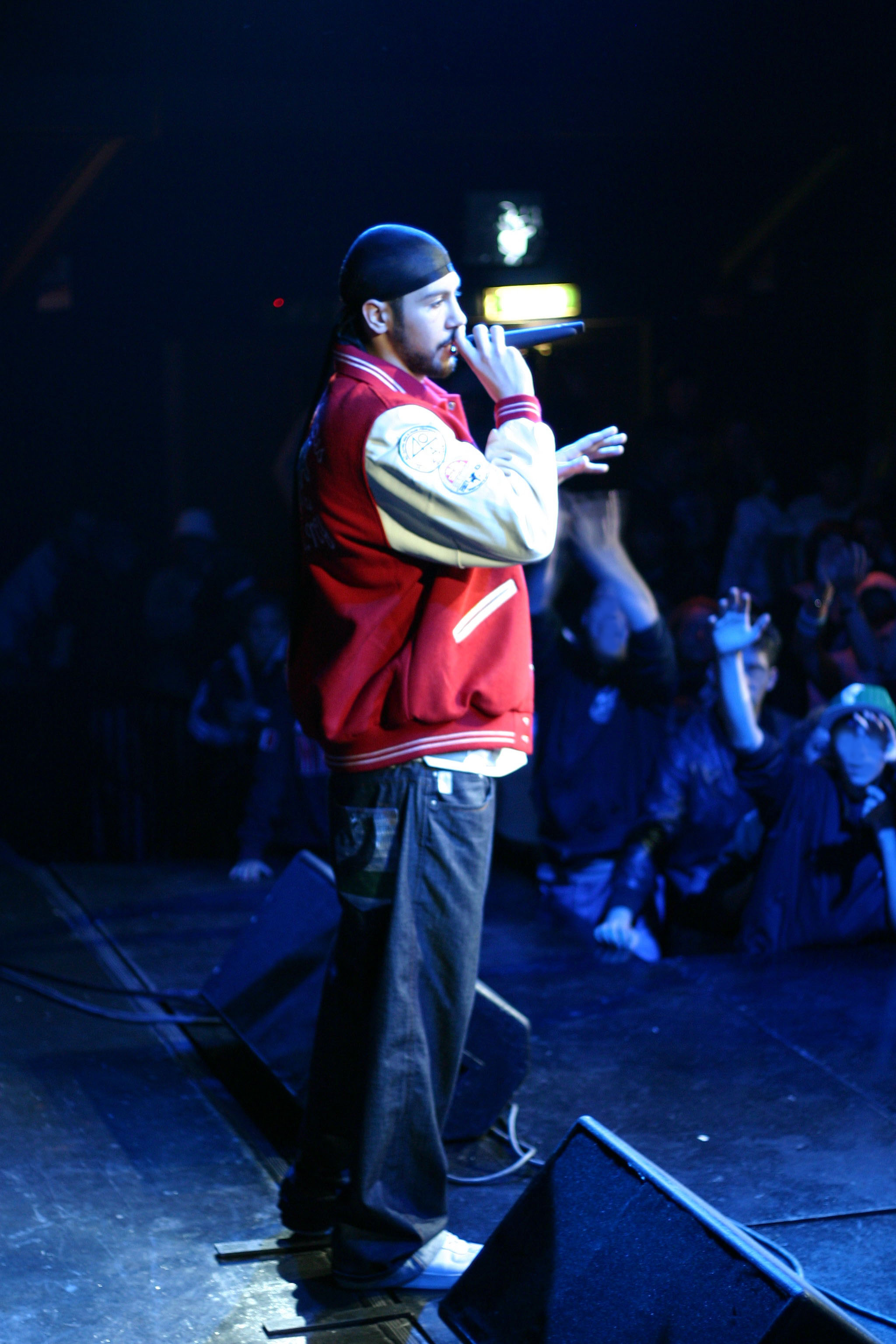 Fotografia di Mondo Marcio pubblicata con l'autorizzazione del detentore dei diritti Paifo. (Wikipedia:Autorizzazioni ottenute/Mondo Marcio)